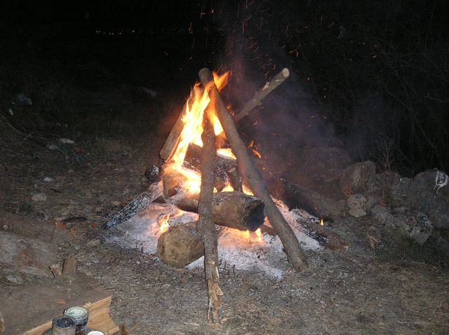 Badnjak